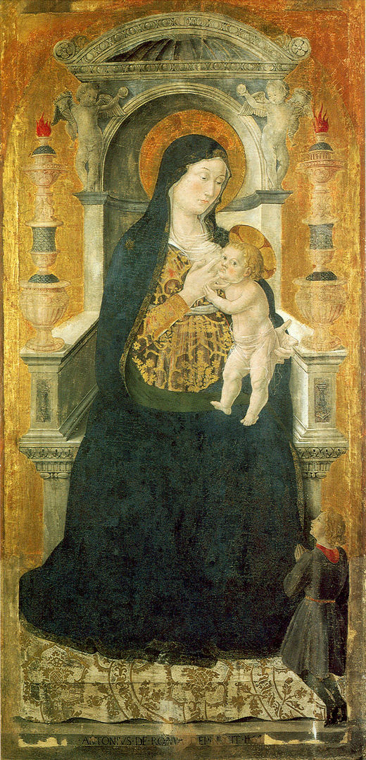 Madonna dell Lattelabel QS:Lit,"Madonna dell Latte"label QS:Les,"Virgen de la Leche"